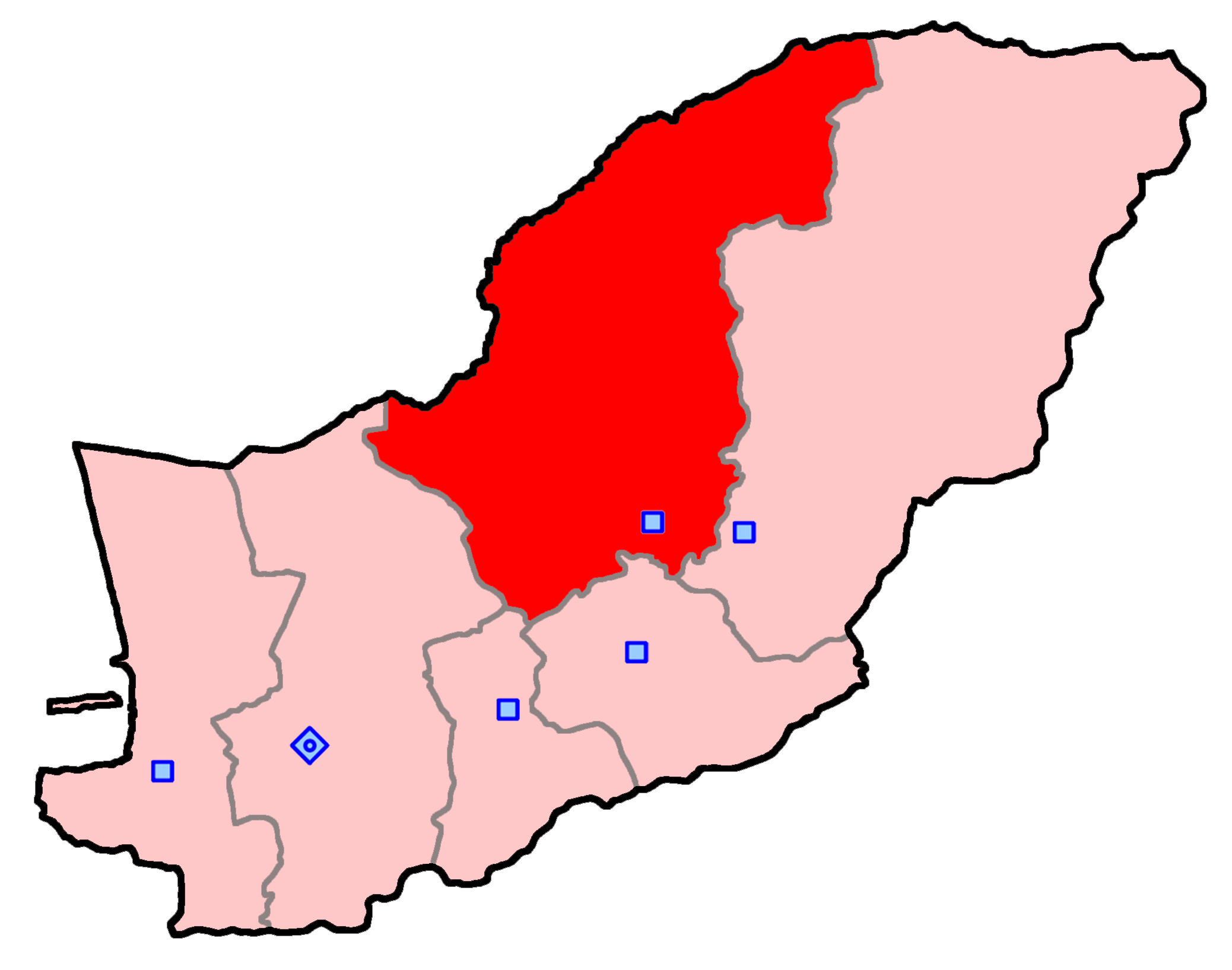 حوزه‌ گنبد کاووس برای انتخابات مجلس شورای اسلامی